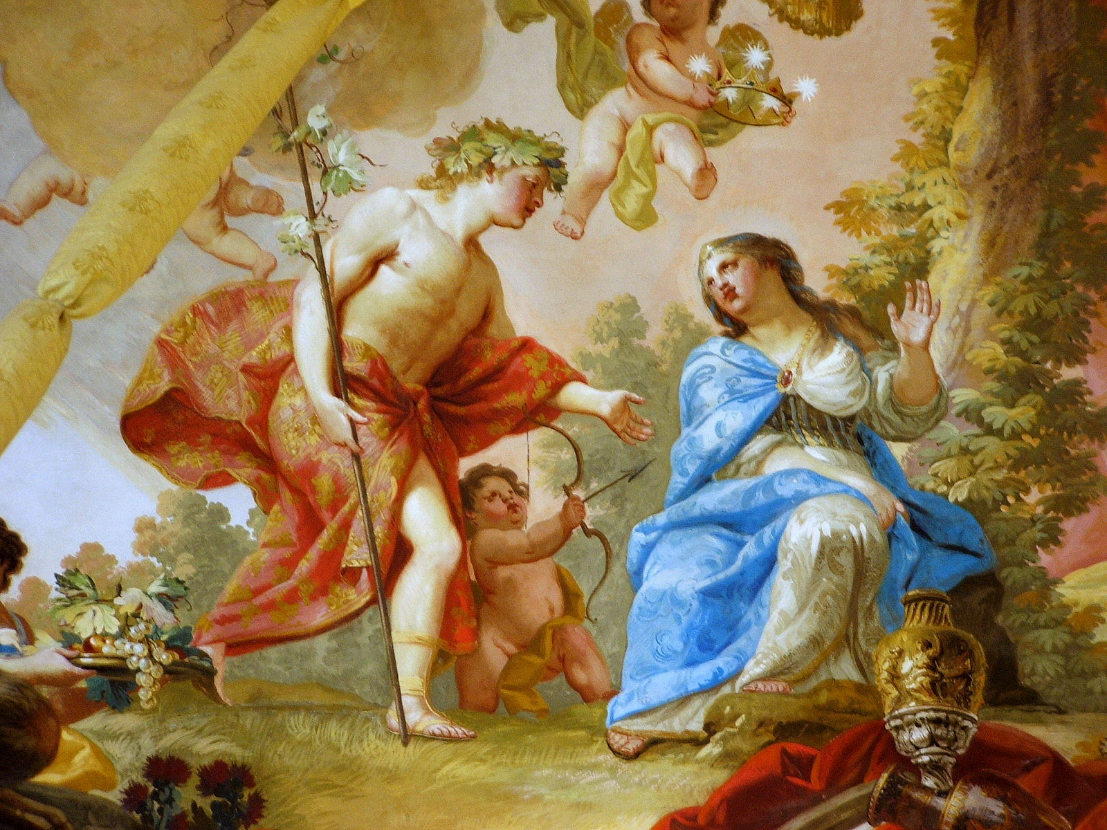 Caserta, immagini dalla Reggia di Caserta Affresco